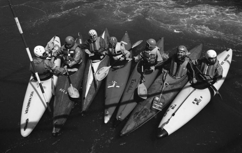 Juni 1988, Hildesheim, Kajak-Training auf der Innerste